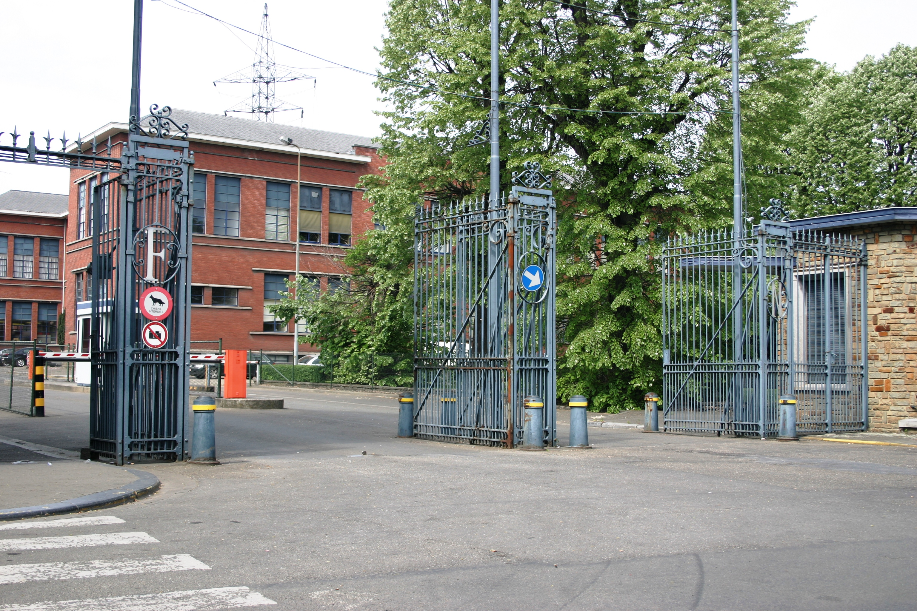 D'Portal vun FN zu Herstal.